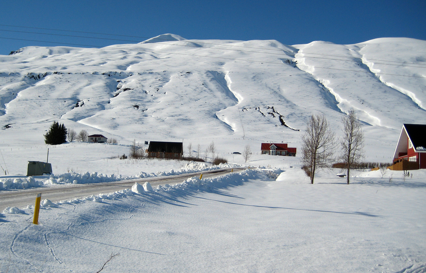 Laugahlíð í Svarfaðardal, Tjarnargarðshorn